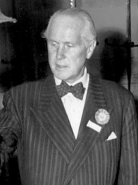 Professor Andreas Lindblom till vänster visar Démétre Loukatos en rustning som tillhört Sigismund II av Polen och Johan III.Gustav Vasa introducerades högtidligen för de 250 deltagarna i den första internationella kongressen för folklivsforskare efter kriget, då professor Andreas Lindblom hälsade välkommen i Nordiska museets stora sal vid det informella öppnandet på söndagen. Milles bistra kolossalstaty i ek såg nästan ut att vilja dra på munnen, då Salvador de Madariaga, president i International Commission on Folk Arts and Folklore, i ett svarstal förklarade att "varje människa absolut borde vara etnolog" – och i varje fall skrattade den samlade expertisen hjärtligt.